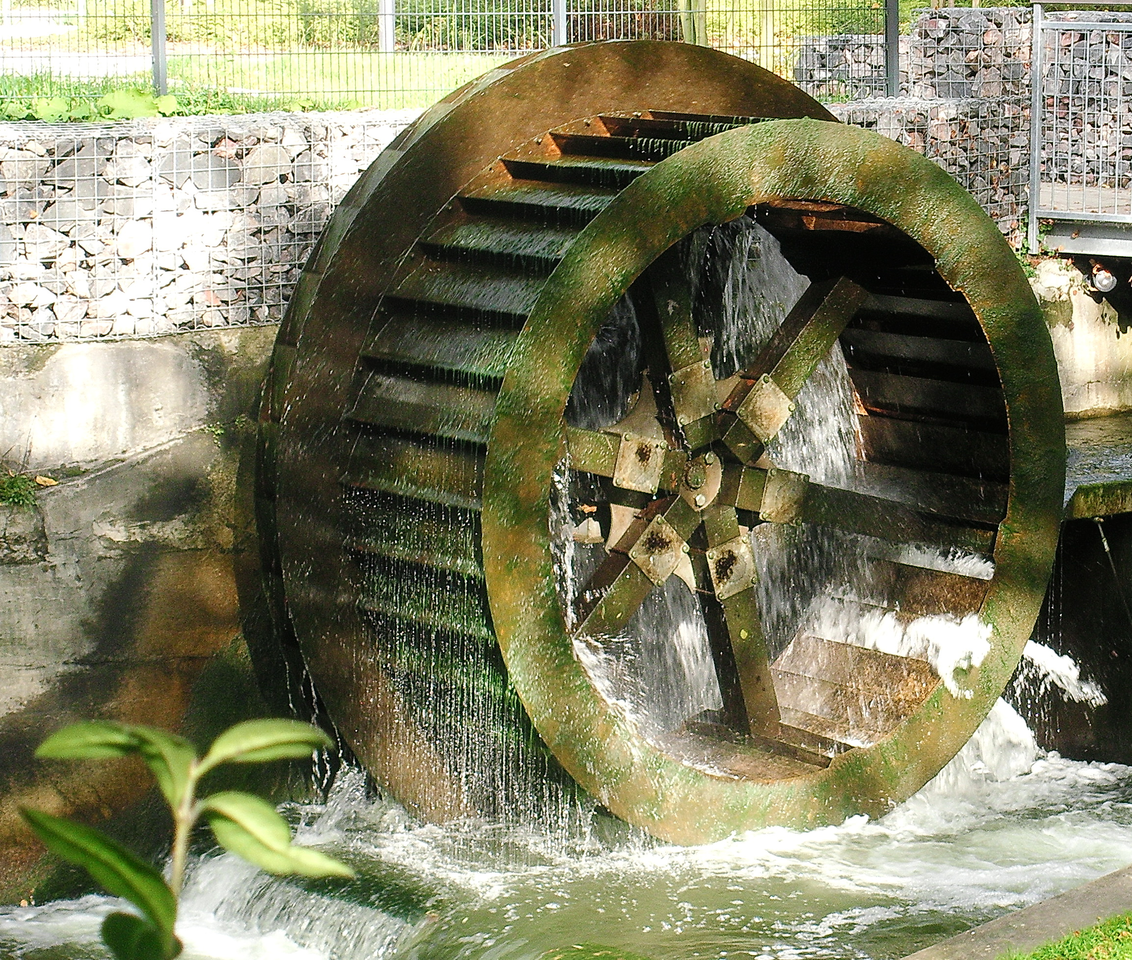 Wasserrad in Menden (Sauerland) an der Einmündung des Mühlengrabens in die Hönne